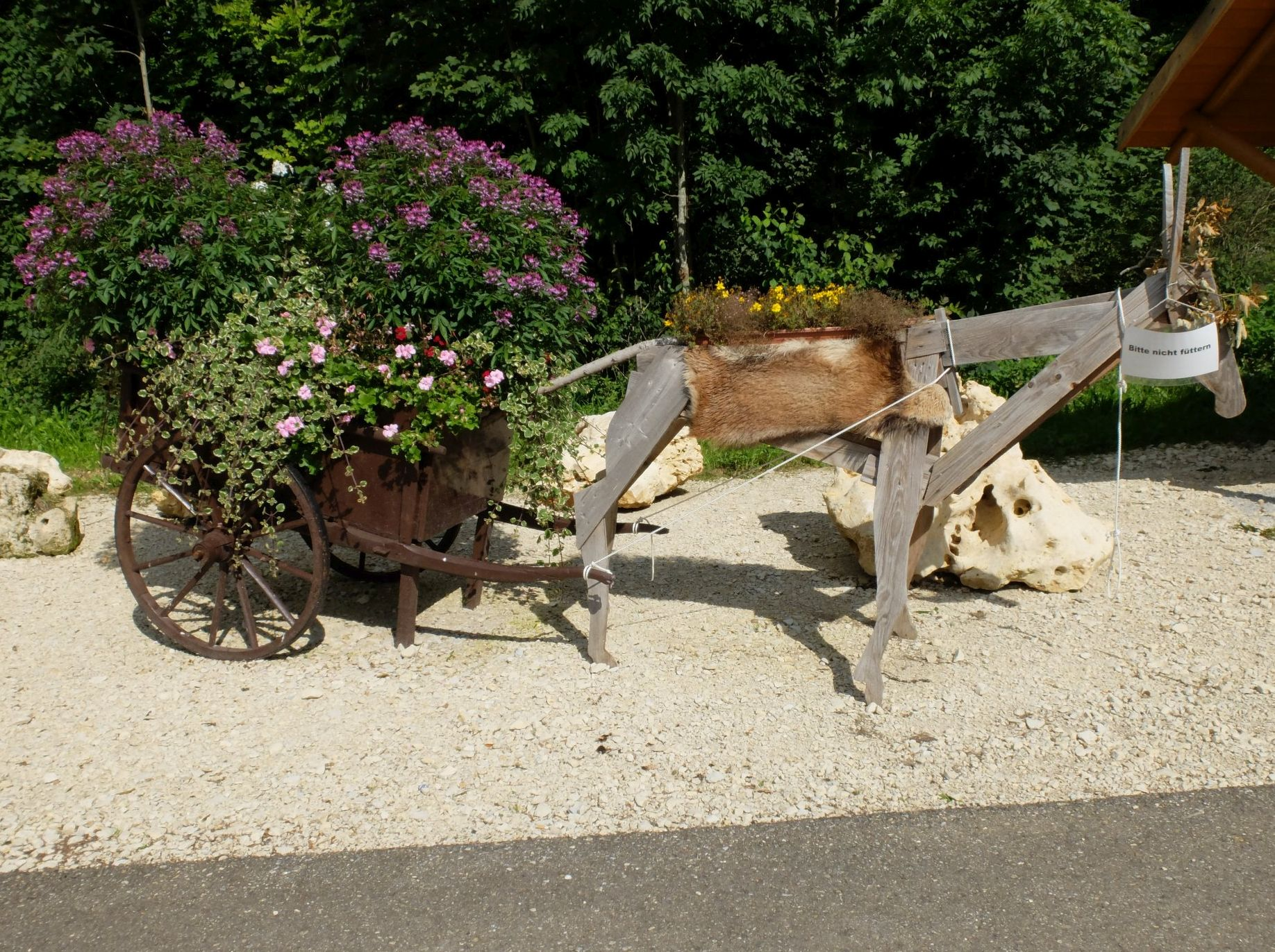 Irndorf, Landkreis Tuttlingen in Baden-Württemberg. „Bitte nicht füttern“.